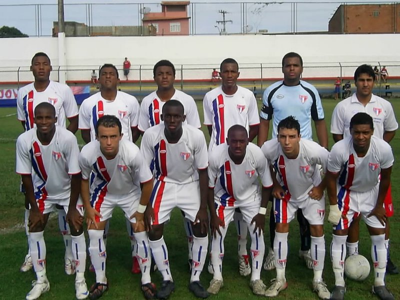 Equipe profissional do São João da Barra Futebol Clube. Foto de Paulo Roberto Rodrigues.